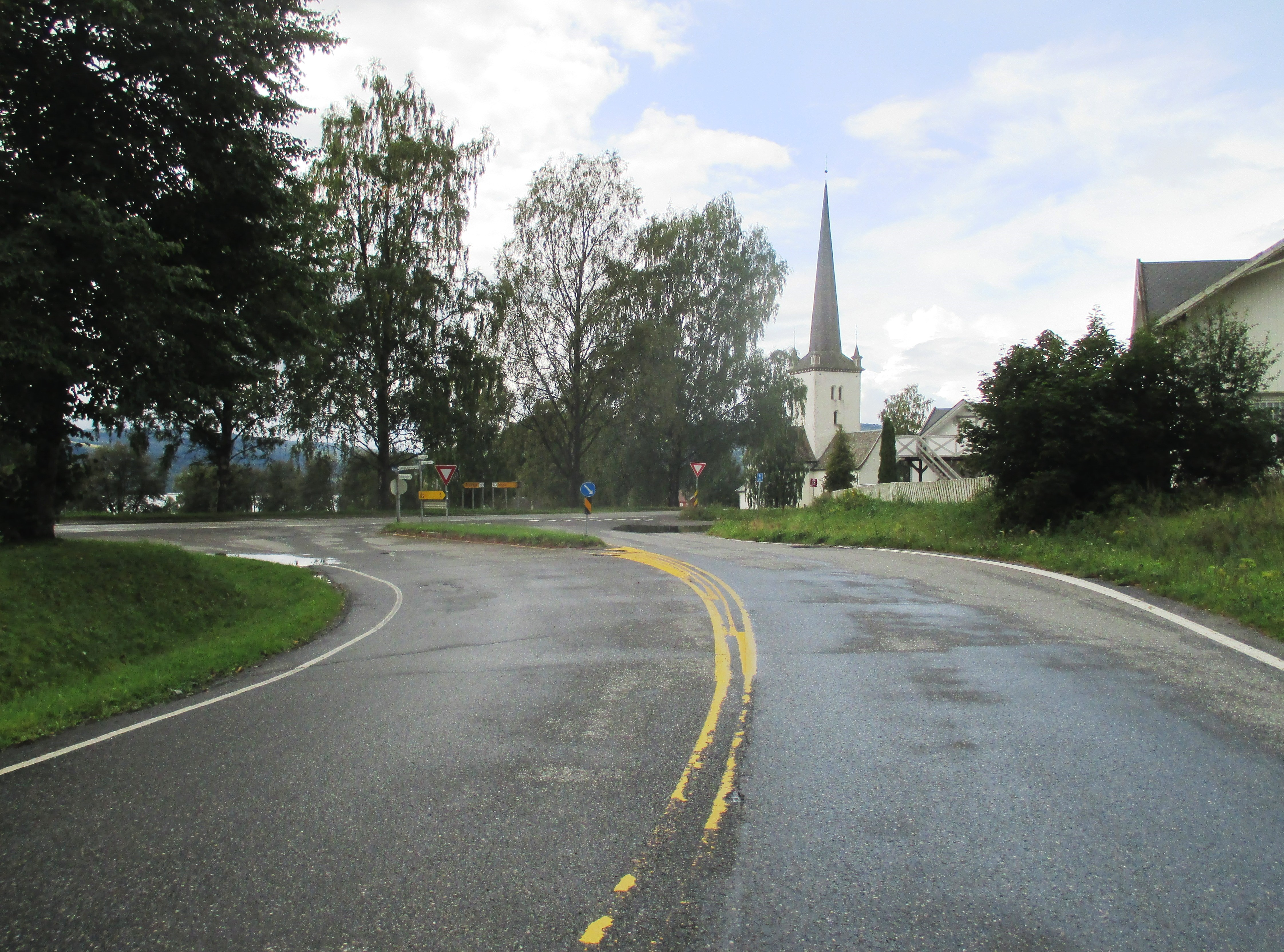 Åshøgdvegen (FV1786, tidl. FV95) like ved FV213 og Ringsaker kirke